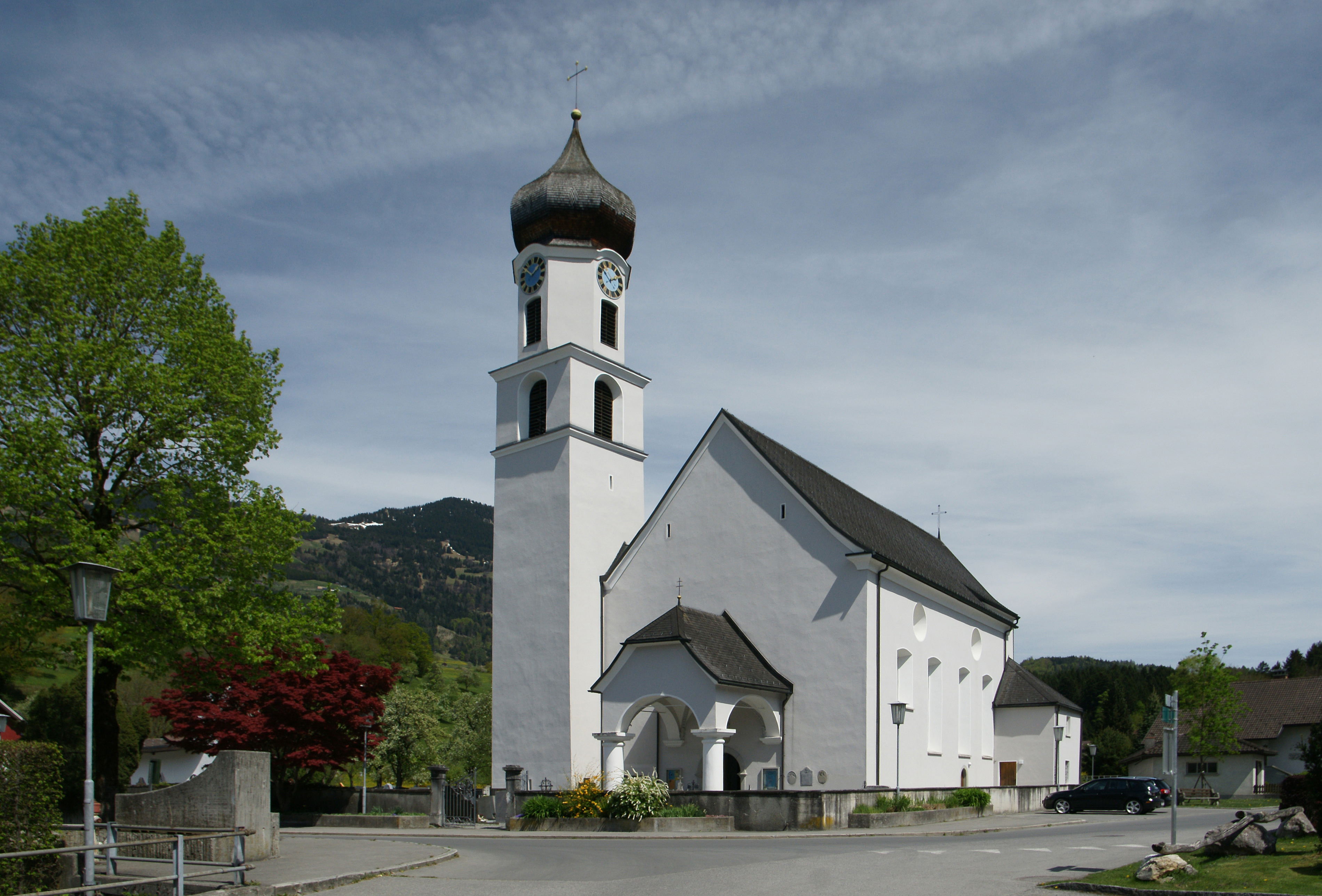 Pfarrkirche "Unsere Liebe Frau Unbefleckte Empfängnis" in Schlins, Vorarlberg.